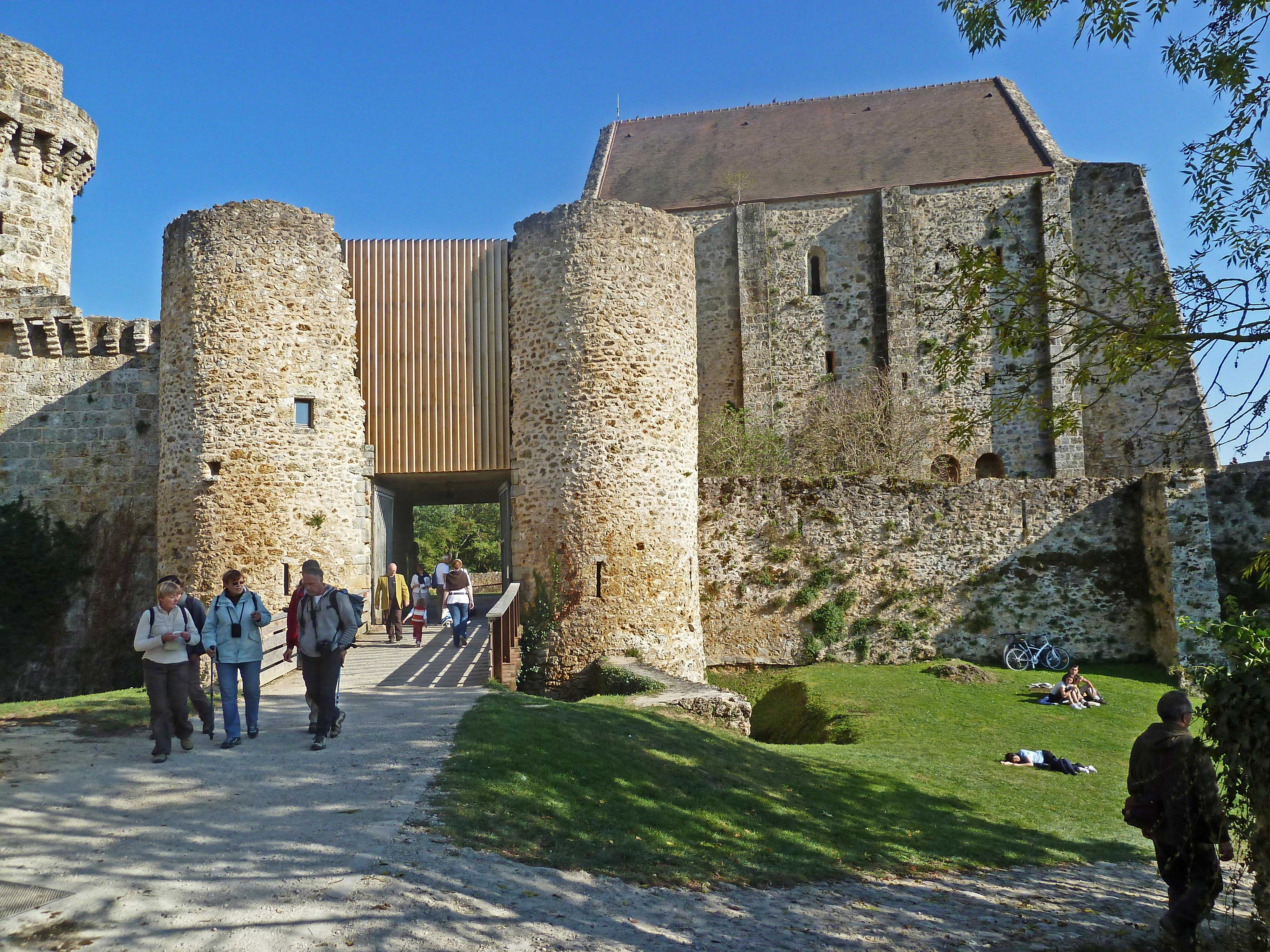 11è au 19è siècle